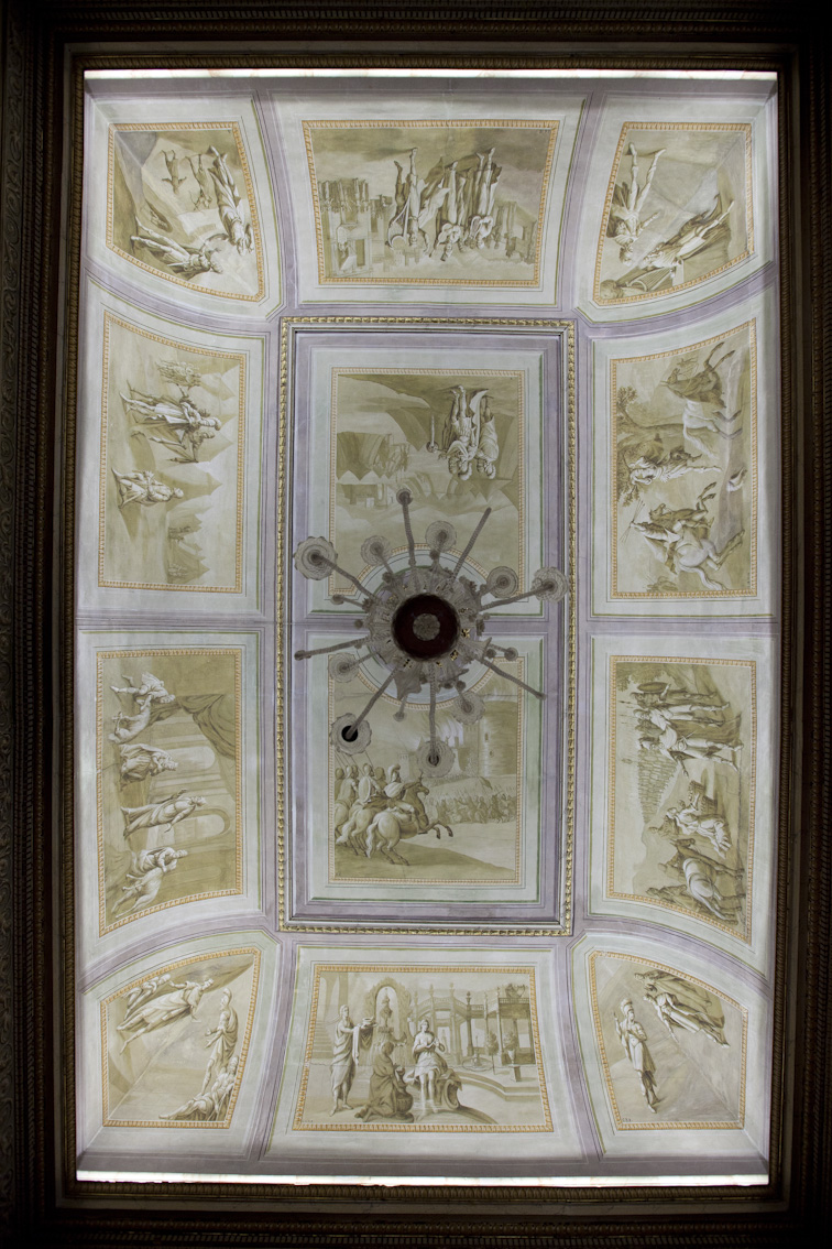 Can Papiol - Sostre de la Sala de Ball